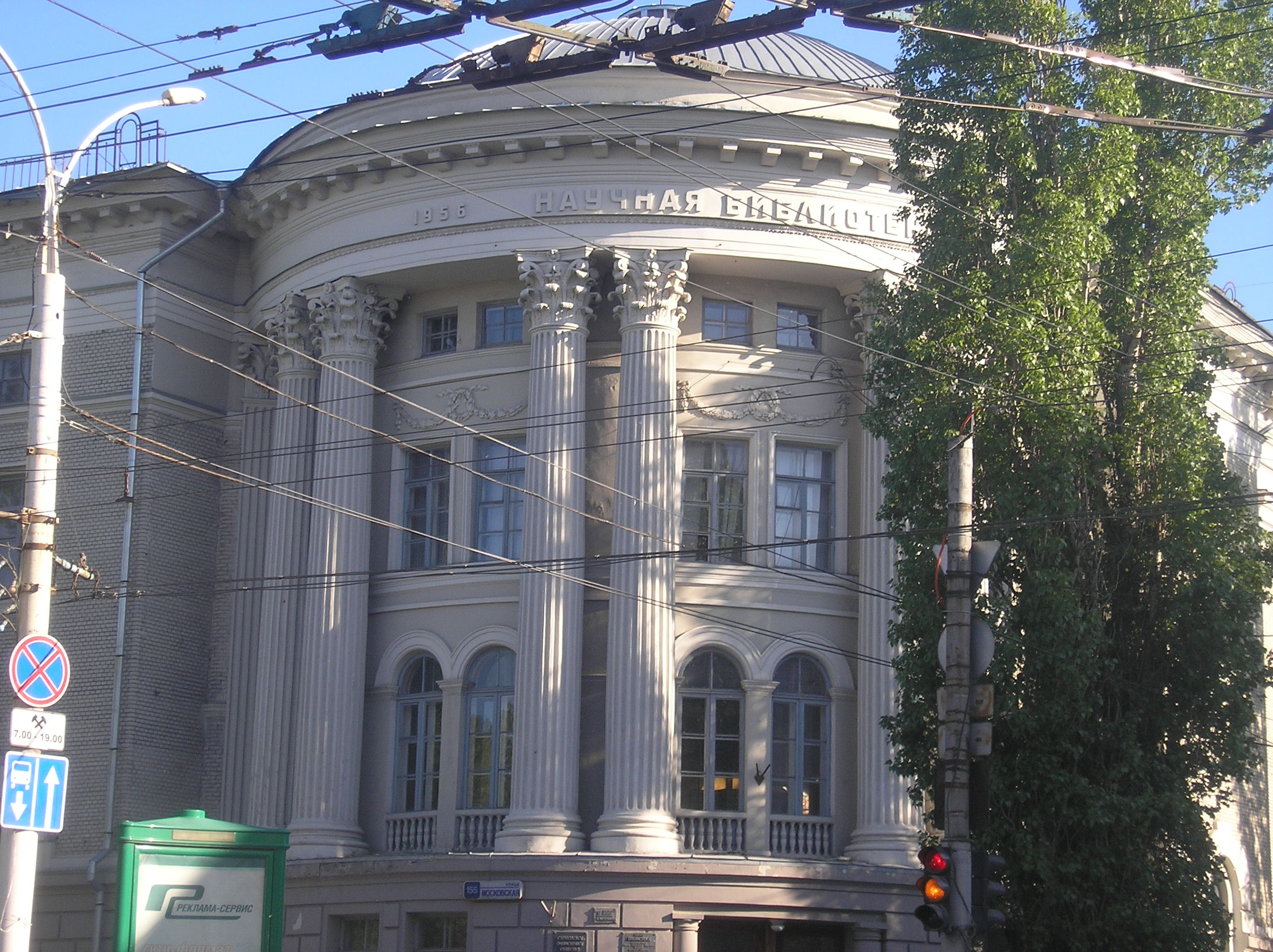 Научная библиотека Саратовского Государственного университета, ул. Московская 155, угол ул. Университетская 42, Саратов.